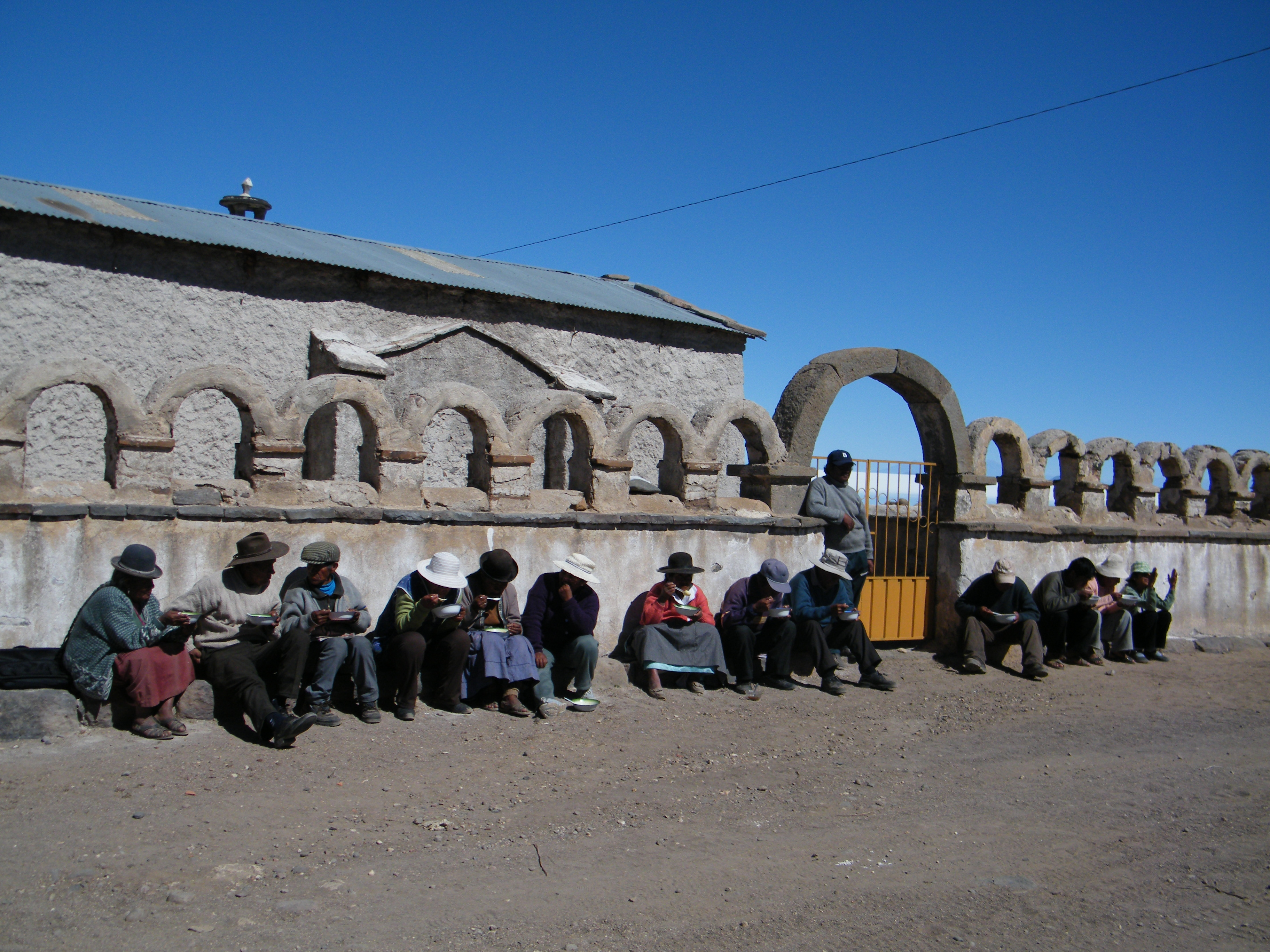 Moradores esperando para una reunion comunitaria